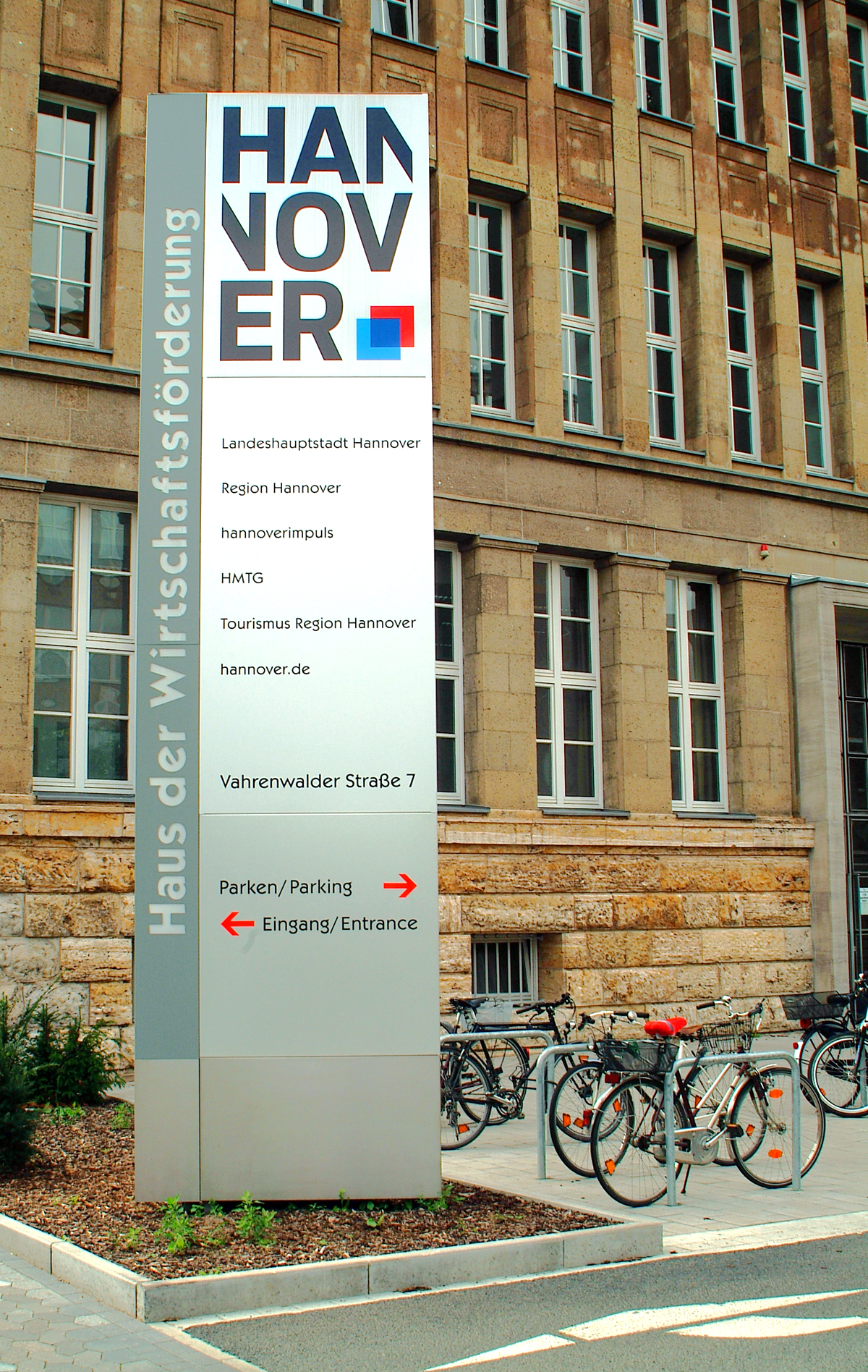 Das Haus der Wirtschaftsförderung unter die Aegidie der Landeshauptstadt und der Region Hannover ist unter anderem Sitz von hannoverimpuls, der HMTG Hannover Marketing und Tourismus GmbH, der Tourismus Region Hannover sowie von hannover.de. Rechts der Informationstafel finden Besucher mehr als genug Parkplätze.